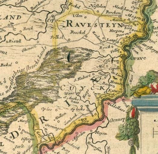 Herrschaften Cuyk und Ravenstein (Ausschnitt aus der Karte von Blaeu: Brabantia Ducatus (Herzogtum Braband) von 1645